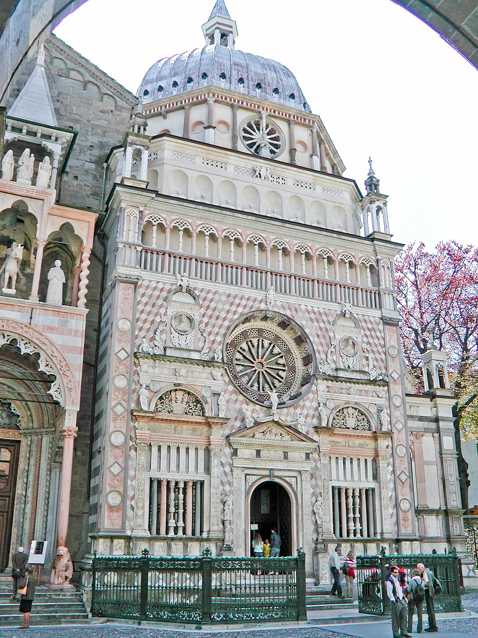 facciata Bergamo, Italy